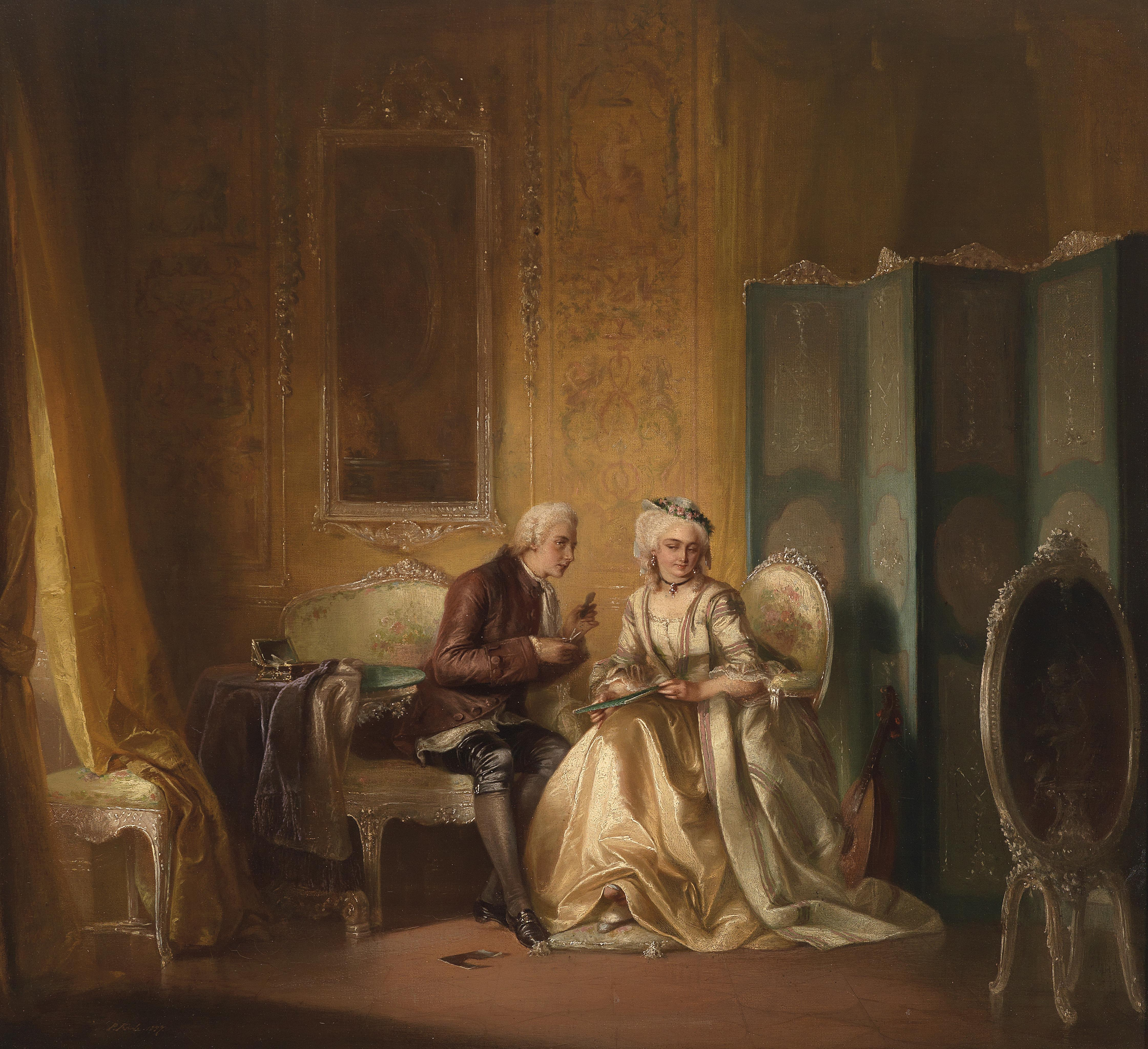 Saloninterieur mit jungem Mann, der die Silhouette einer Dame schneidet